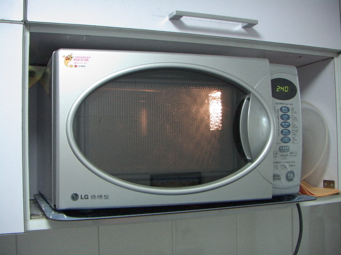 LG燒烤型微波爐